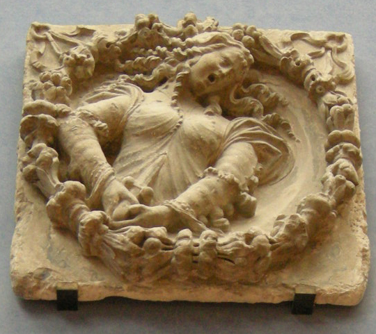 Museo bardini, prima sala, suicidio di didone, ambito di niccolò dell'arca